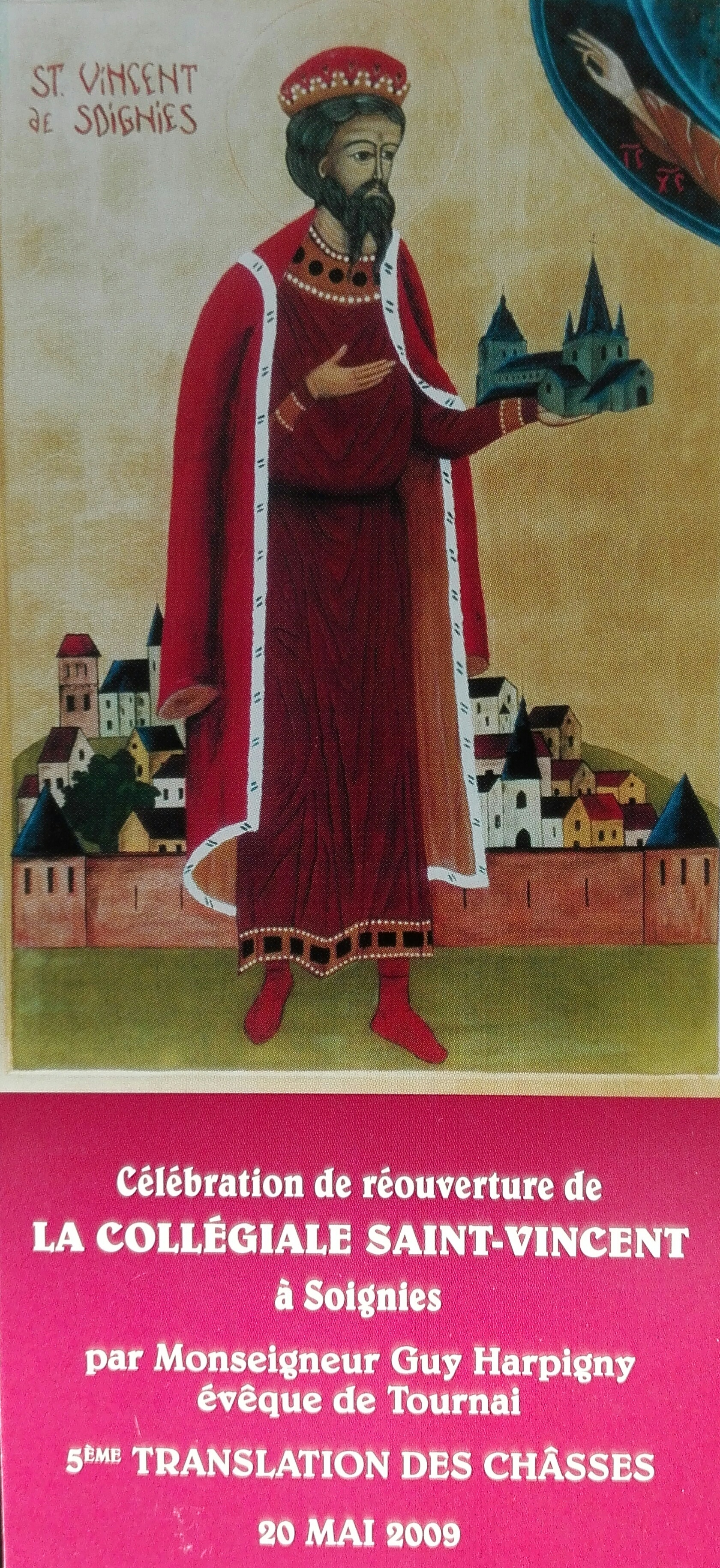 Carte qu'on trouve au sein de la Collégiale St.Vincent.